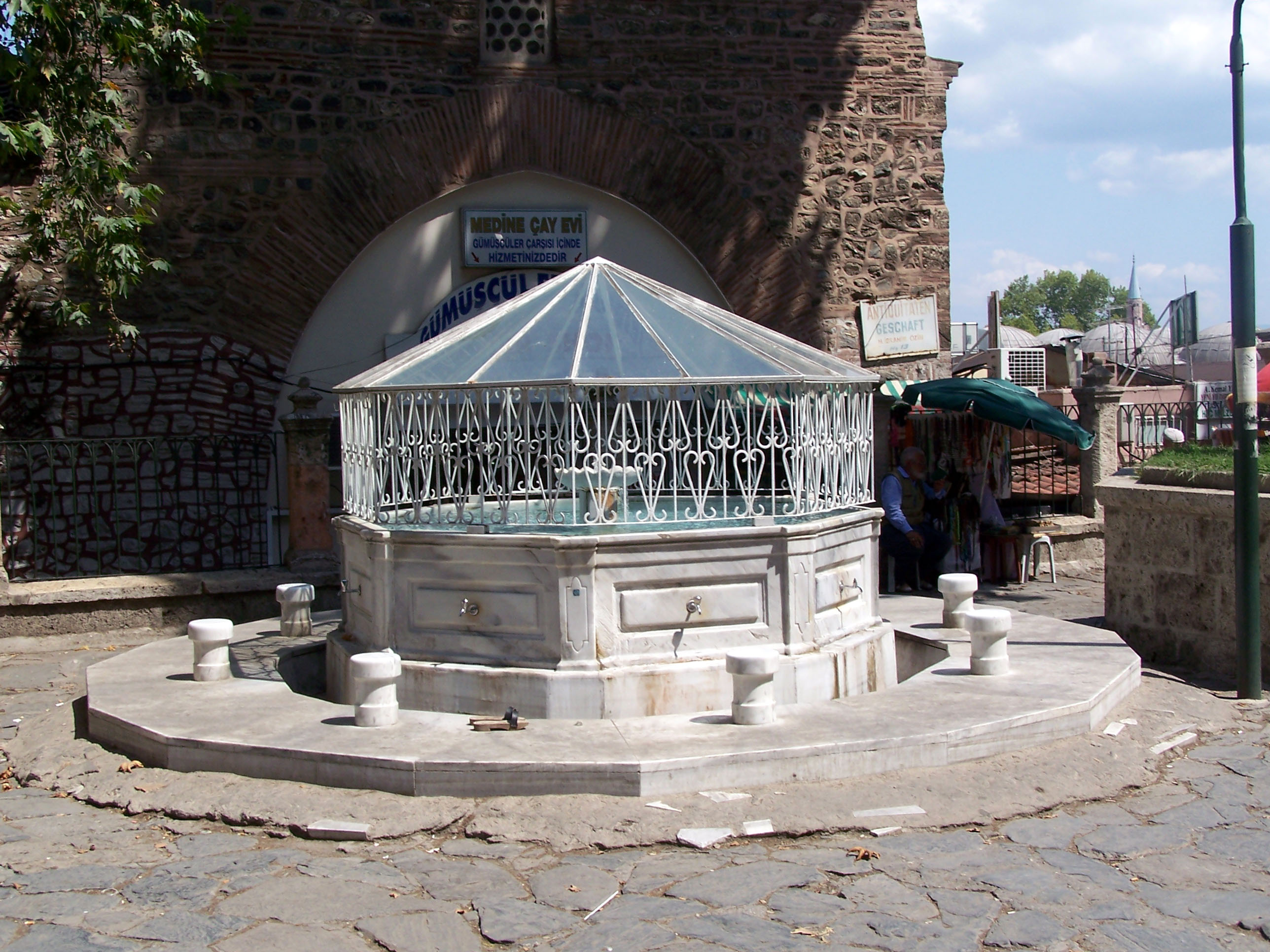 Şadırvan of Ulu Camii in Bursa, Turkey